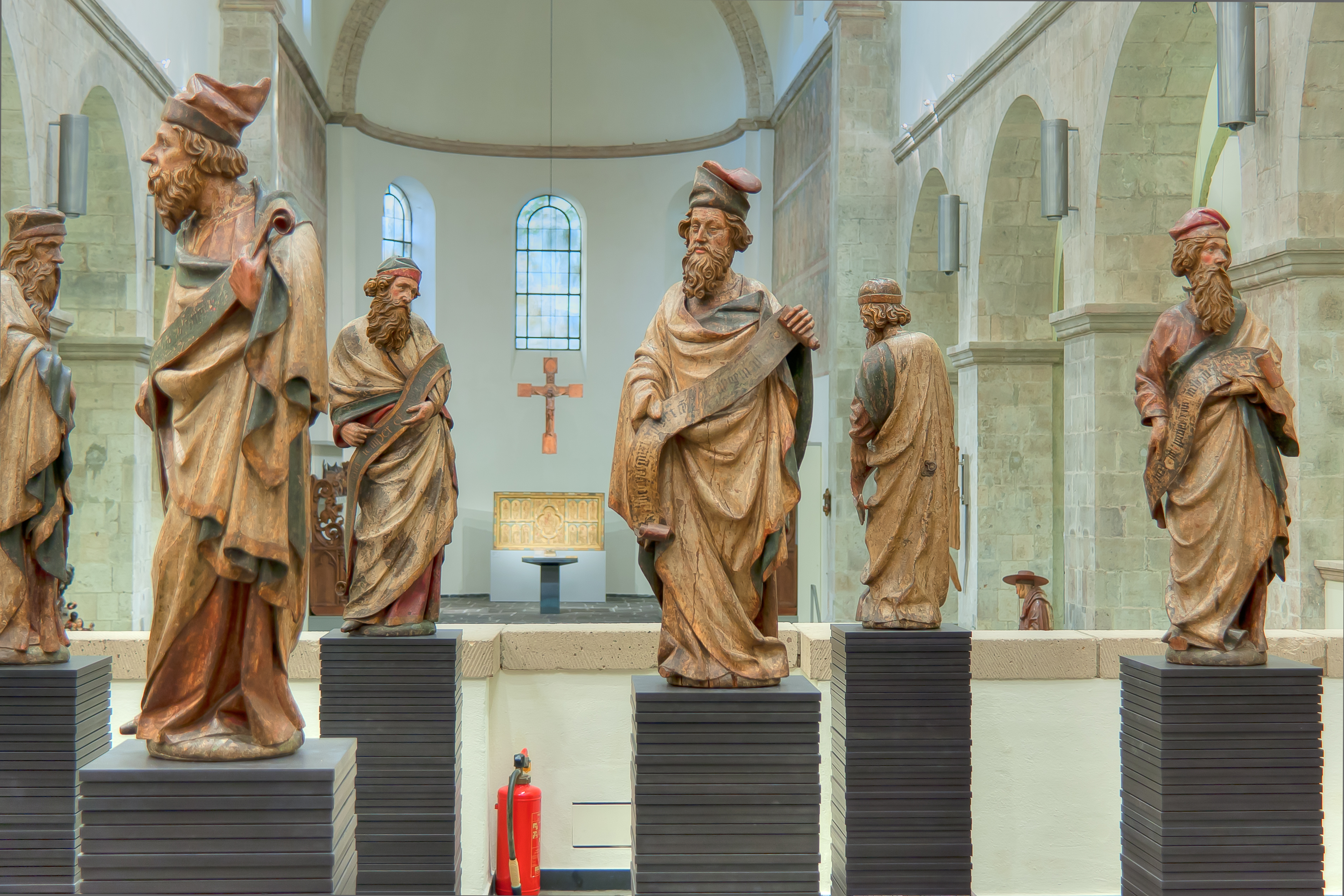 St. Cäcilien, heute Teil des Museum Schnütgen. Westempore, Propheten aus dem Kölner Rathaus